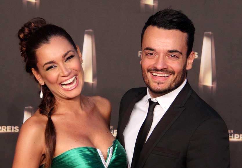 Jana Ina und Giovanni Zarrella beim Deutschen Fernsehpreis 2012